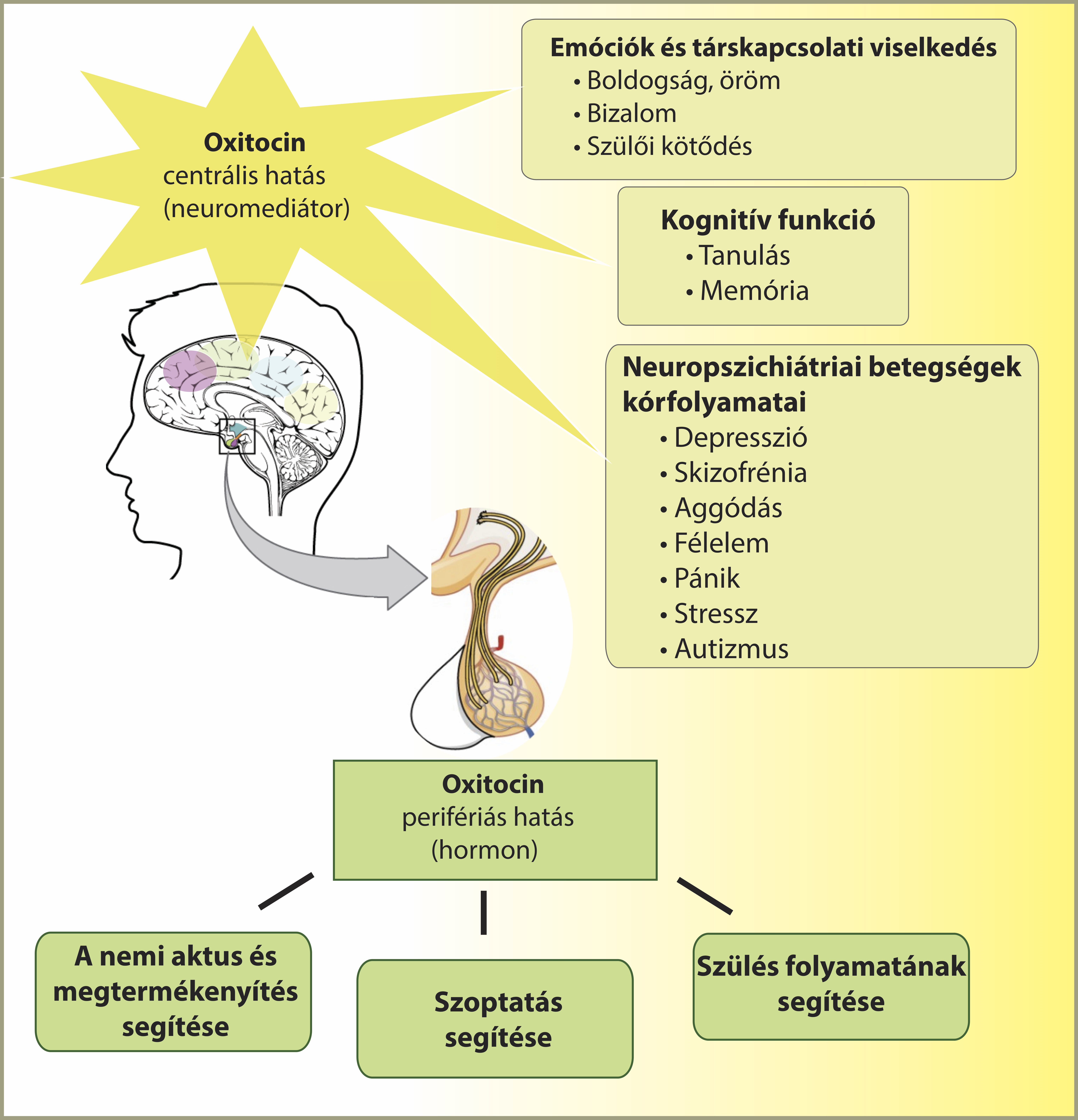 Oxitoxin centrális és perifériás hatásainak összefoglaló ábrája